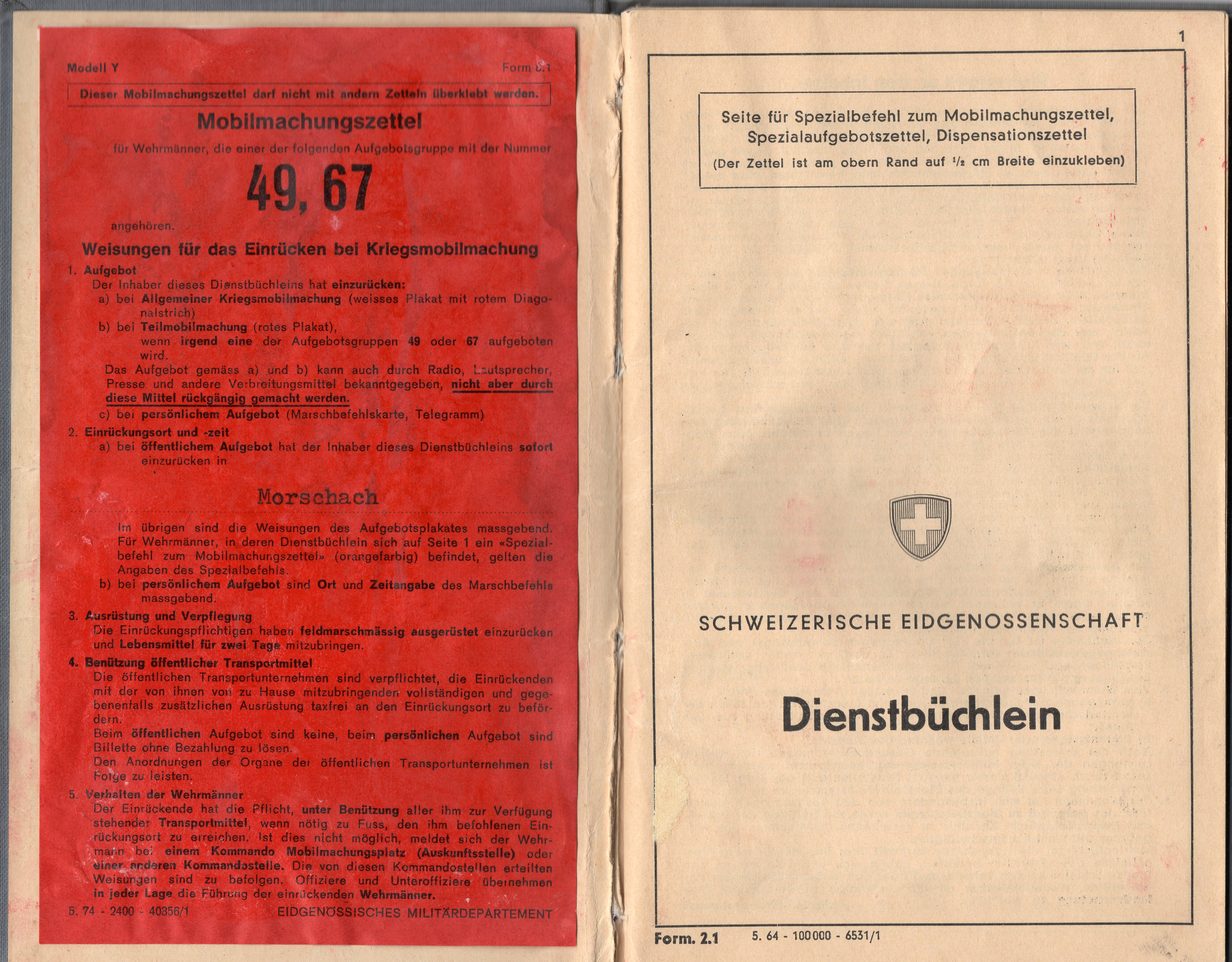 Dienstbüchlein mit Mobilmachungszettel, Armee 61, Schweizer Armee